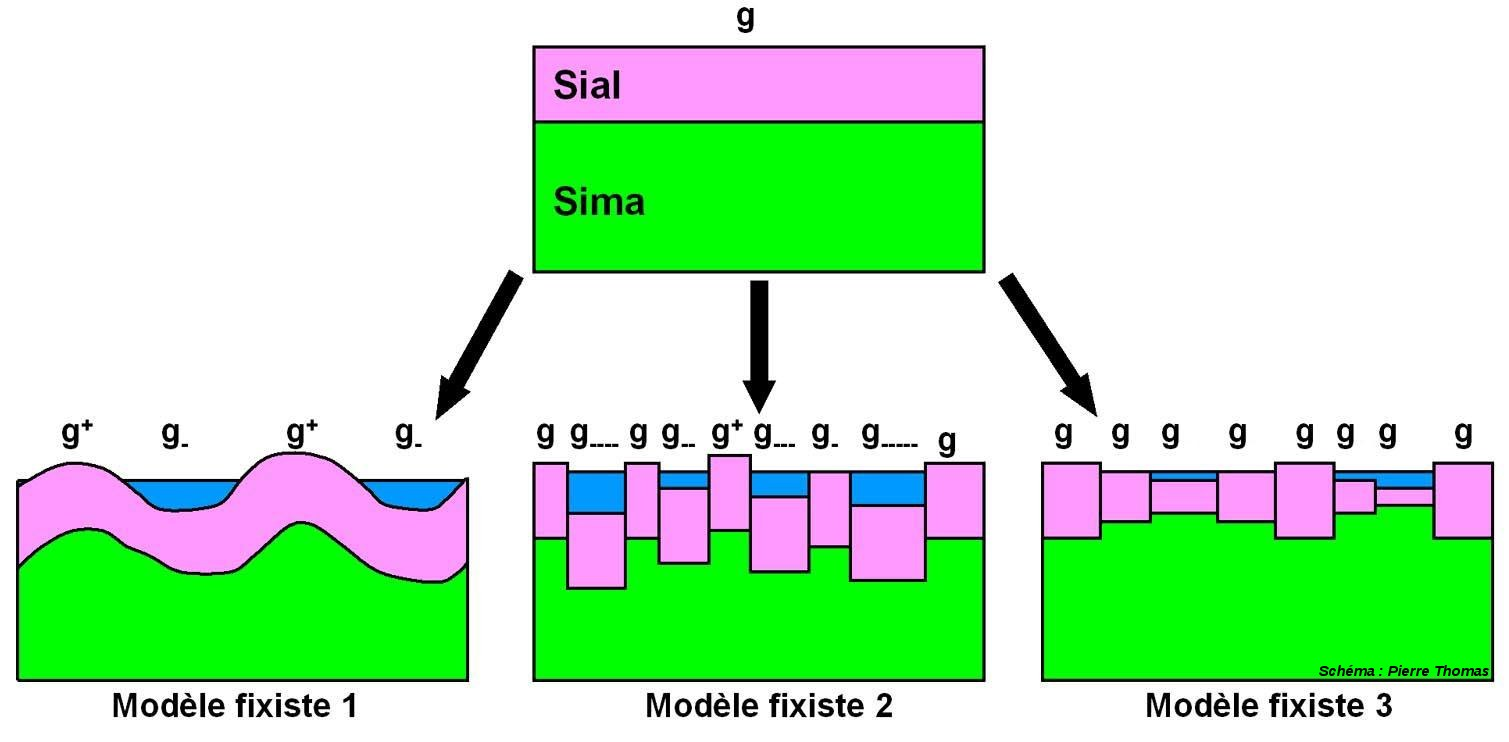 Modèles fixistes avant la théorie de la tectonique des plaques. Dans le modèle 1, les ondulations du sial engendrent les différences d'altitude. Ce modèle n'explique pas la bimodalité des altitudes, ni la quasi-constance de la gravité à la surface du globe. Dans le modèle 2, des blocs de sial sont plus ou moins effondrés. Ce modèle n'explique pas les contraintes précédentes. Dans le modèle 3, les différences d'altitude sont dues à des différences d'épaisseur du sial, sans que cela fasse varier la gravité en surface (modèle d'Airy). Mais la bimodalité des altitudes impose de trouver un processus géologique entraînant une bimodalité des épaisseurs du sial au lieu d'une variation « aléatoire » de cette épaisseur.